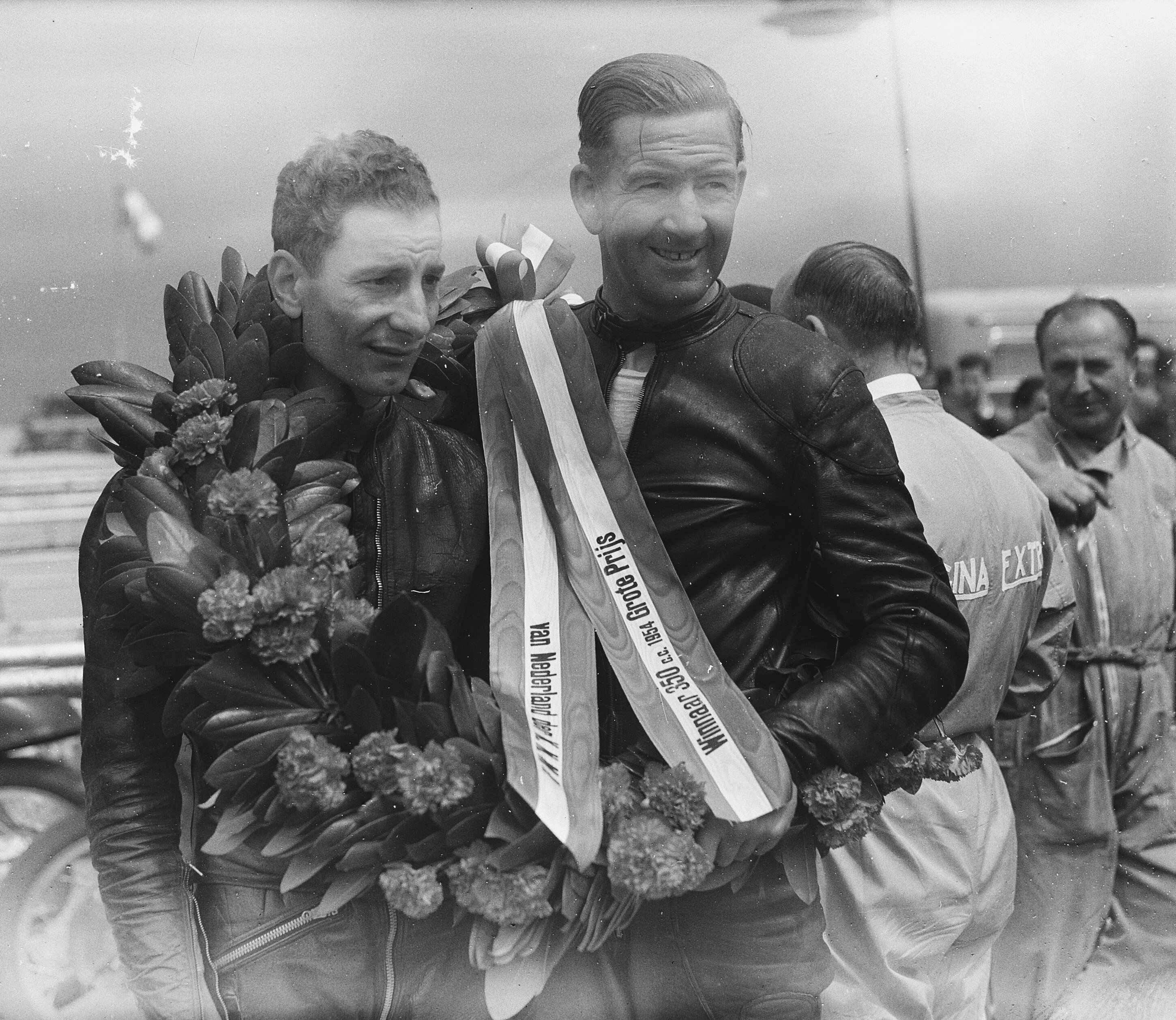 Collectie / Archief : Fotocollectie Anefo Reportage / Serie : [ onbekend ] Beschrijving : TT races Assen , Andersen en Lorenzette 350cc (op Guzzi) Datum : 10 juli 1954 Persoonsnaam : Andersen, Guzzi Instellingsnaam : TT Fotograaf : Bilsen, Joop van / Anefo Auteursrechthebbende : Nationaal Archief Materiaalsoort : Glasnegatief Nummer archiefinventaris : bekijk toegang 2.24.01.09 Bestanddeelnummer : 906-5871